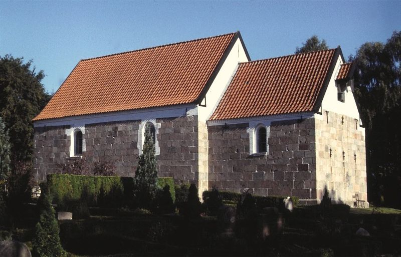 Ellidshøj Kirke i Danmark. Ellidshøj kirke